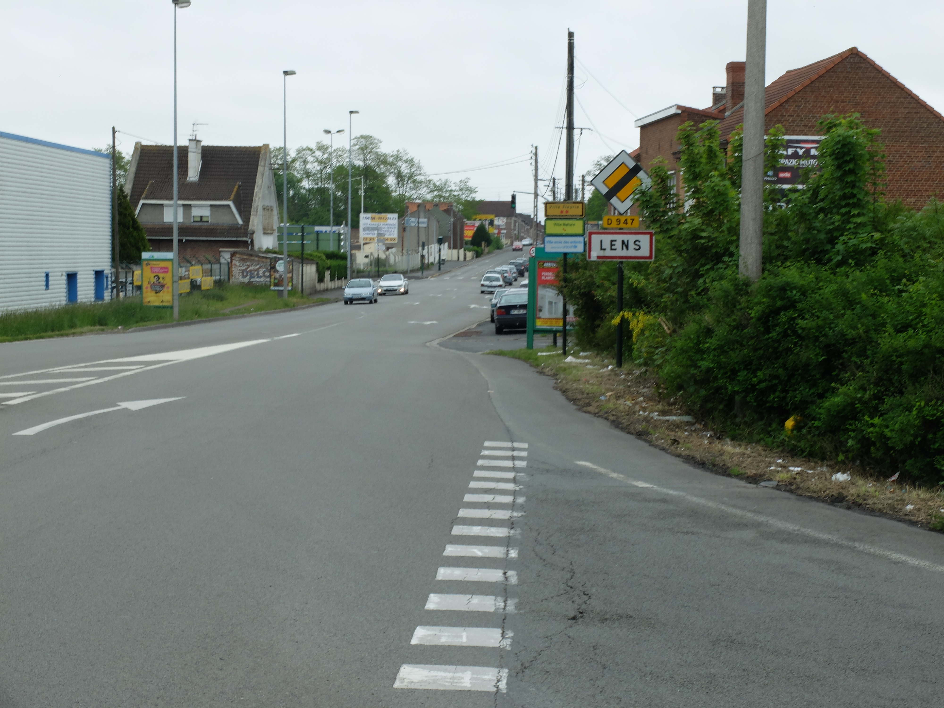 Vue de la Route de La Bassée à l'entrée de Lens (D947).